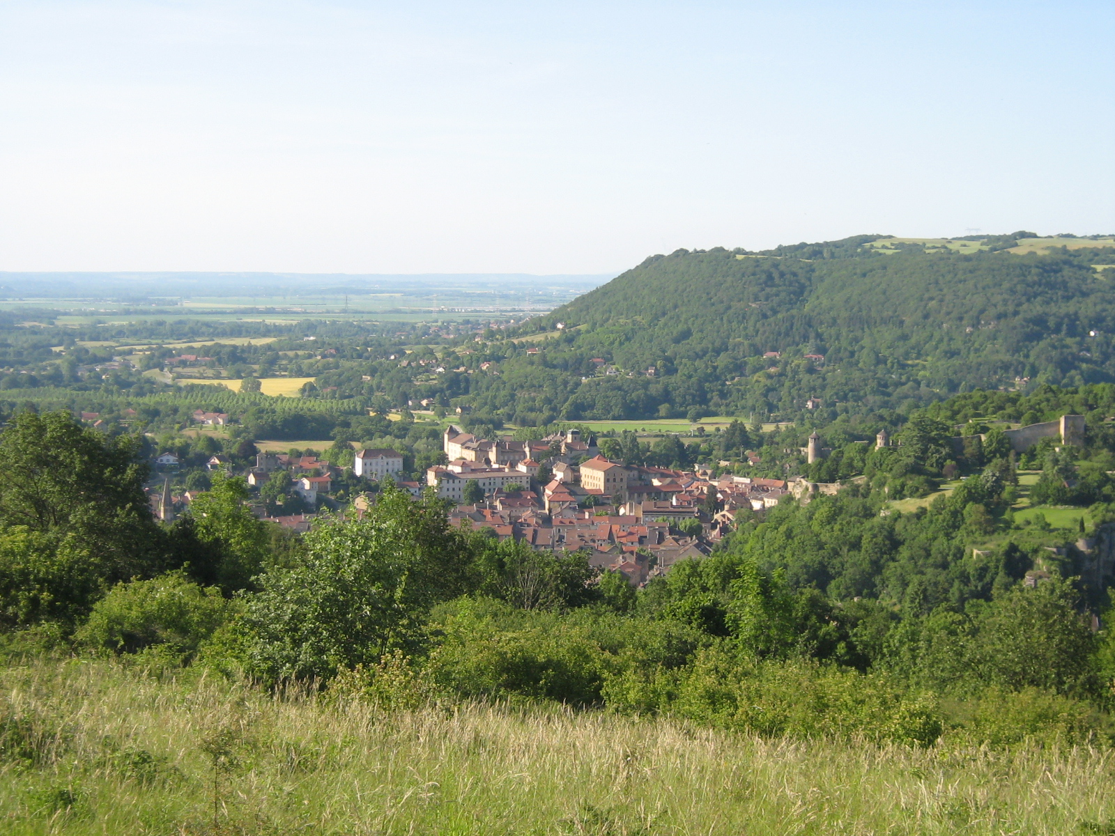 Crémieu vue depuis les hauteurs de Blied.